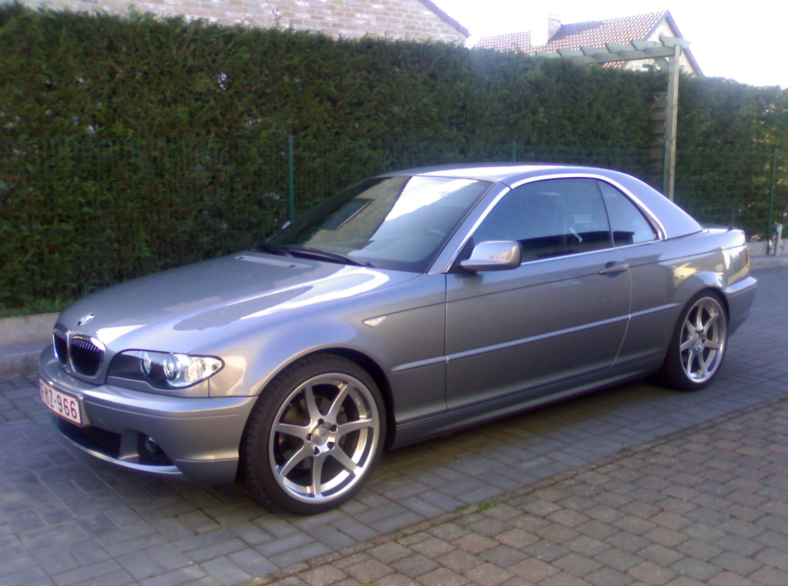 Onze vroeger auto, Bmw 320 cabrio